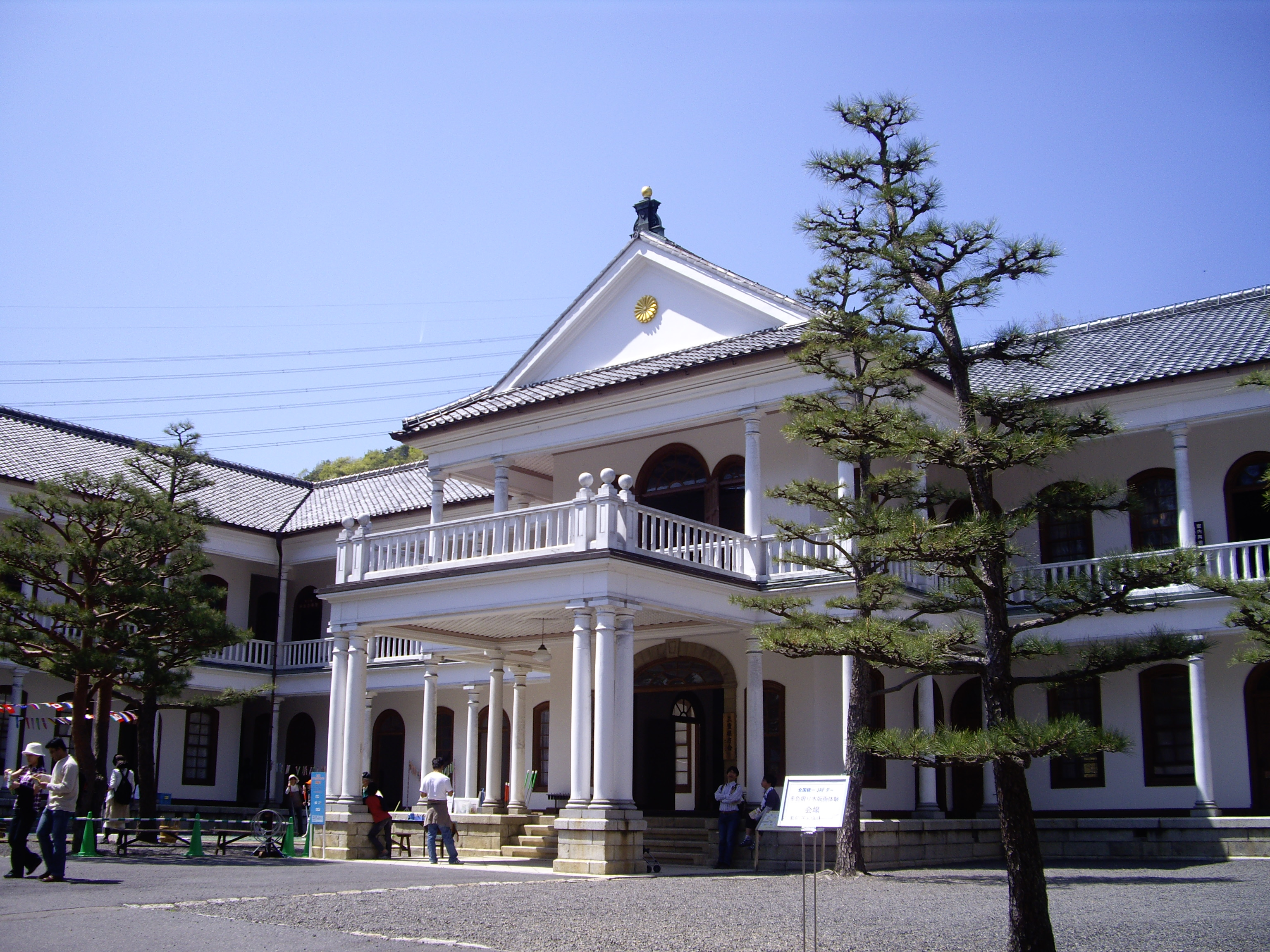 Meiji Mura 旧三重県庁舎